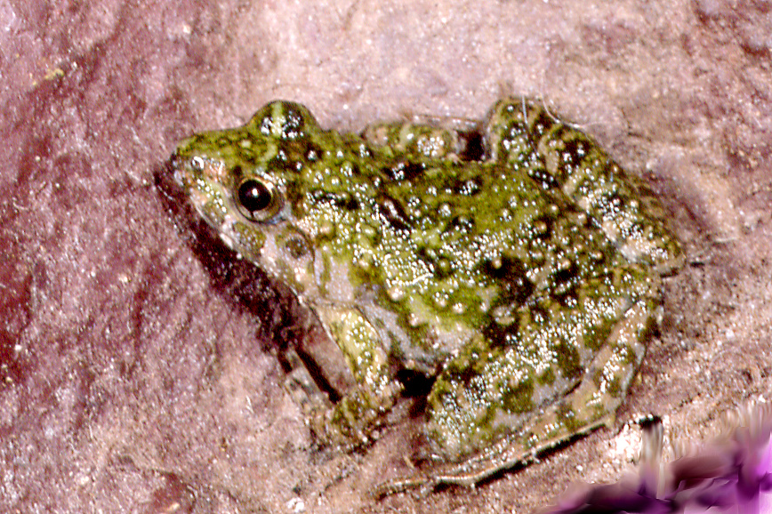 Phrynobatrachus natalensis